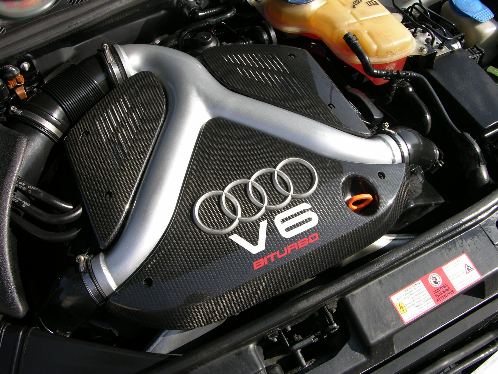 Moteur V6 de l'Audi RS4 B5